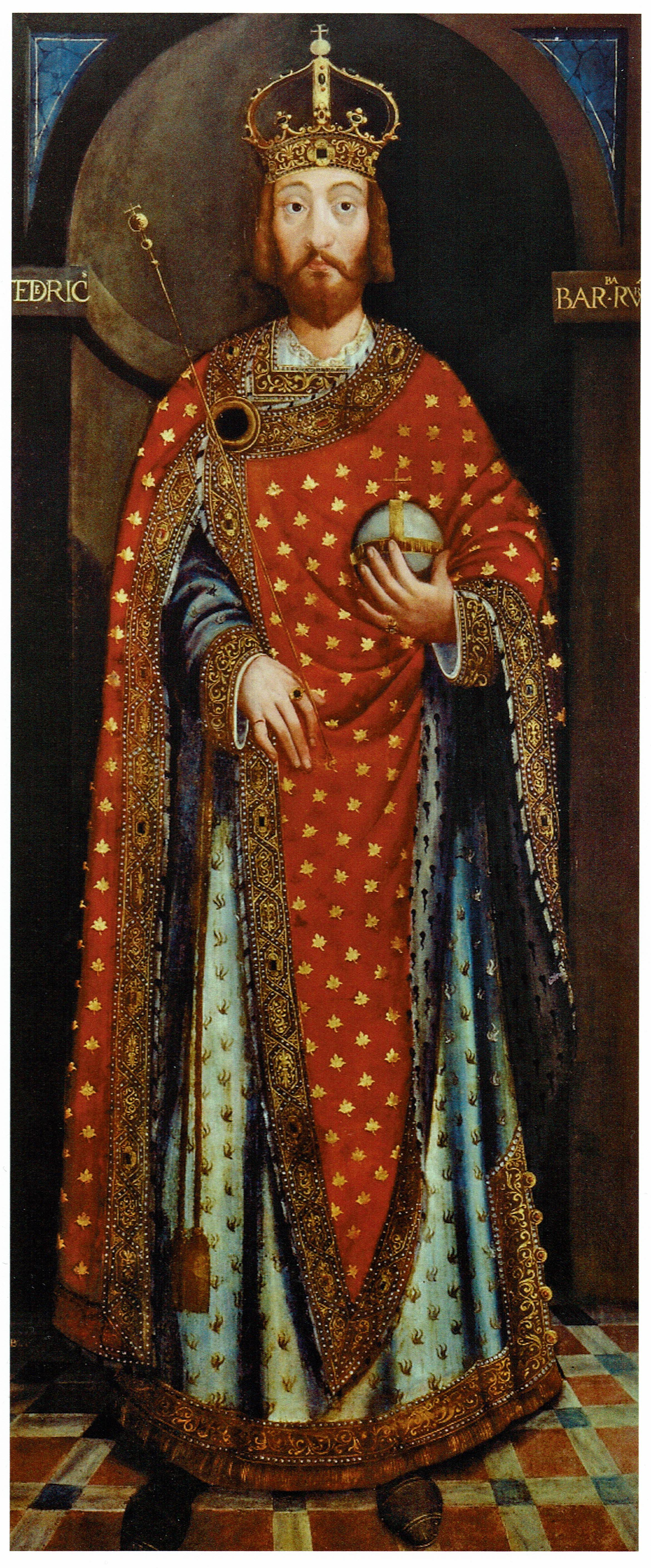 Friedrich Barbarossa, im Archivio Notarile distrettuale zu Pavia befindliches Ölgemälde des Paveser Notars und Malers Bernardo Cane